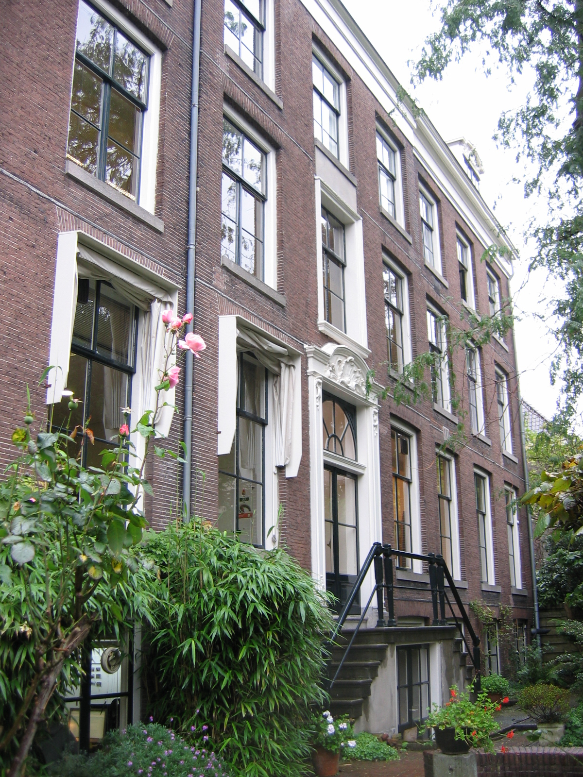 Kerkstraat 310 te Amsterdam Rijksmonument 2934 Huis met ingang aan de straat, doch verder slechts een negen vensters brede achtervleugel (XVIIIc); gesneden ingangspartij en dakkapel aan de straatzijde, achtervleugel onder hoog schilddak, met stoep, gesneden deuromlijsting en gesneden dakkapellen. Voormalige vestiging van Abma, Dirks & Partners architecten, in het begin van de twintigste eeuw hoogstwaarschijnlijk bureau van de architect Eduard Cuypers. Foto uit 1904-1905 toont de achterzijde met de personeelsleden van het atelier voor kunstnijverheid 'Het Huis' (Beeldbank Amsterdam 010003028116) Daarvoor een meisjesweeshuis dat met een grote tuin in verbinding stond met het Doopsgezinde Weeshuis of 't Mennoniten-Weeshuys aan de Prinsengracht 1011-1017. (Beeldbank Amsterdam 010097011355)